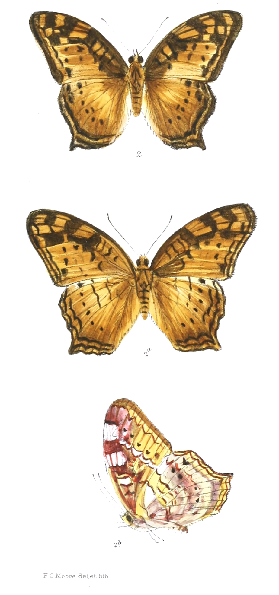 Issoria sinha (male) = Vagrans egista sinha